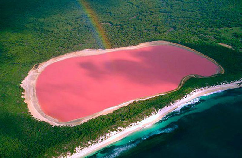 Liqeni Hillier - Australi